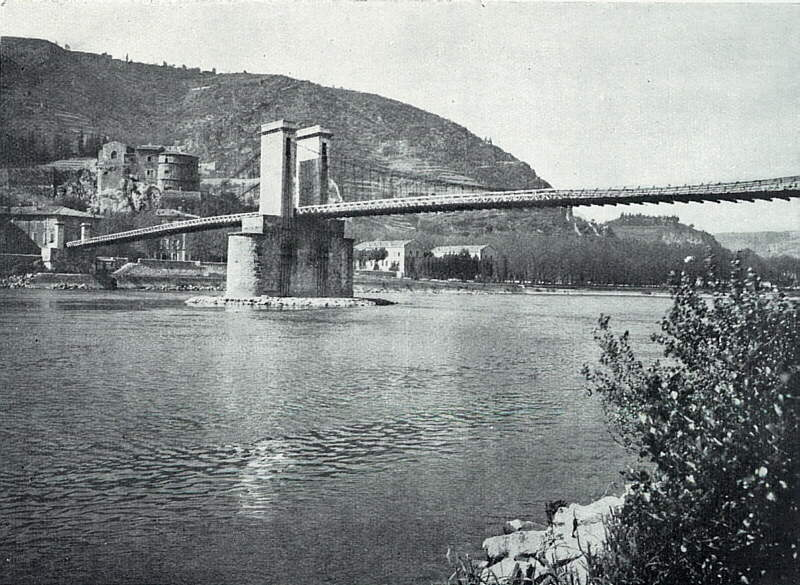 Le pont de Tournon-sur-Rhône de 1825 conçu par Marc Seguin, France